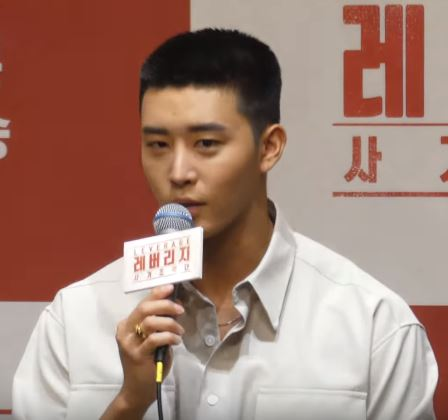 10일 오후 서울시 구로구 신도림동 라마다 서울신도림호텔에서 TV CHOSUN '레버리지 : 사기조작단'의 제작발표회가 열려 배우 이동건, 전혜빈, 김새론, 김권, 여회현이 참석해 포토타임을 갖고 있다